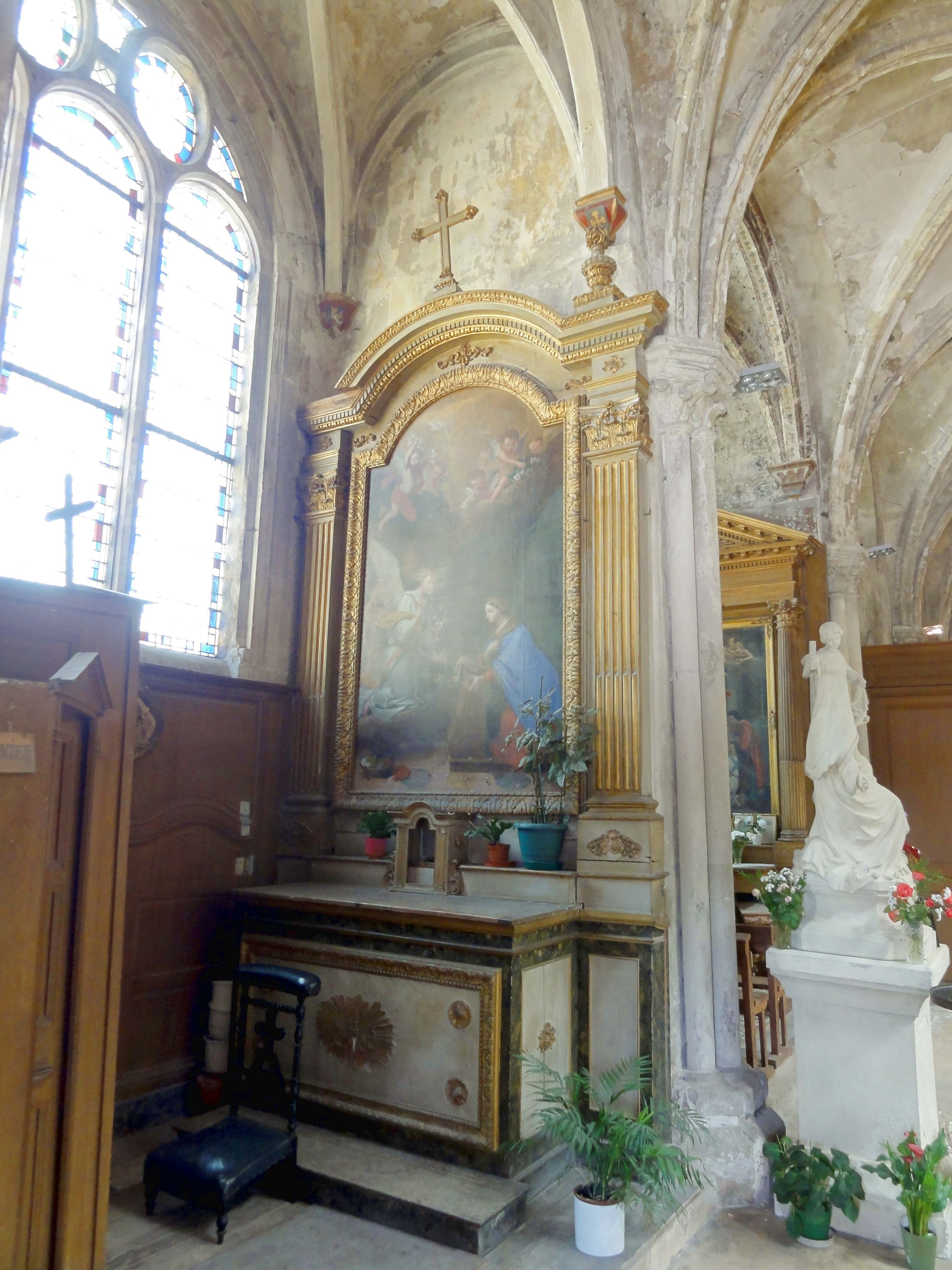 Voir titre.